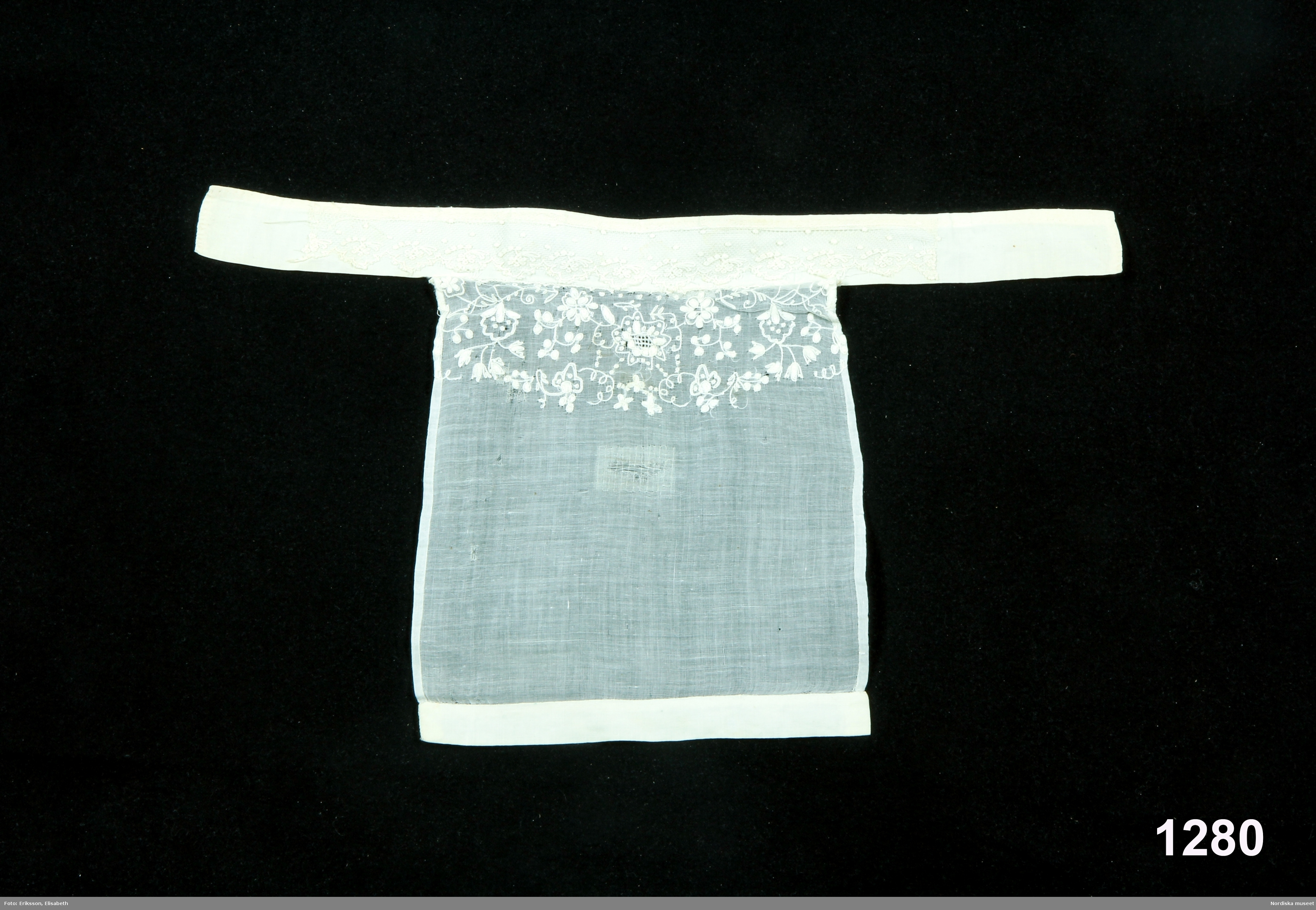 Bilaga: Finns ej. Katalogkort: Finns ej. Nattkappa, det vill säga löskrage för kvinna, i glesvävt tuskaftat bomullstyg. Rektangulär bröstlapp, längd: 26 cm, bredd: 21 cm. Hopsydd med krage, höjd 3,5 cm, bredd 45 cm, tuskaftat bomullstyg. På bröststlappens övre del finns ett kantbroderi i tambursöm, slingrande småblommigt mönster. Vikt fåll i kanterna, 0,5 cm och nedtill 2 cm. Krage av tuskaftat bomullstyg försedd med påsydd bit av tyllbroderi på nätbotten. Nattkappan är handsydd. Bröstlappen kan vara del av ett större tambursömsbroderi. Anm: I fältet för komplettering till sakord har tidigare uppgift att den tillhört en kvinna tagits bort. Men i Ljusdal användes sådana i kvinnodräkten, bl.a uppmärksammat av Ingrid Dahlin. Den ingår också i en hel uppsättning kläder av den typ som kvinnor bar i Ljusdals sn. enl uppgift omkr. 1820-1860. Konservering av en mindre bristning gjord på baksidan av bröstlappen. /Inga-Lill Eliasson 2008-01-16